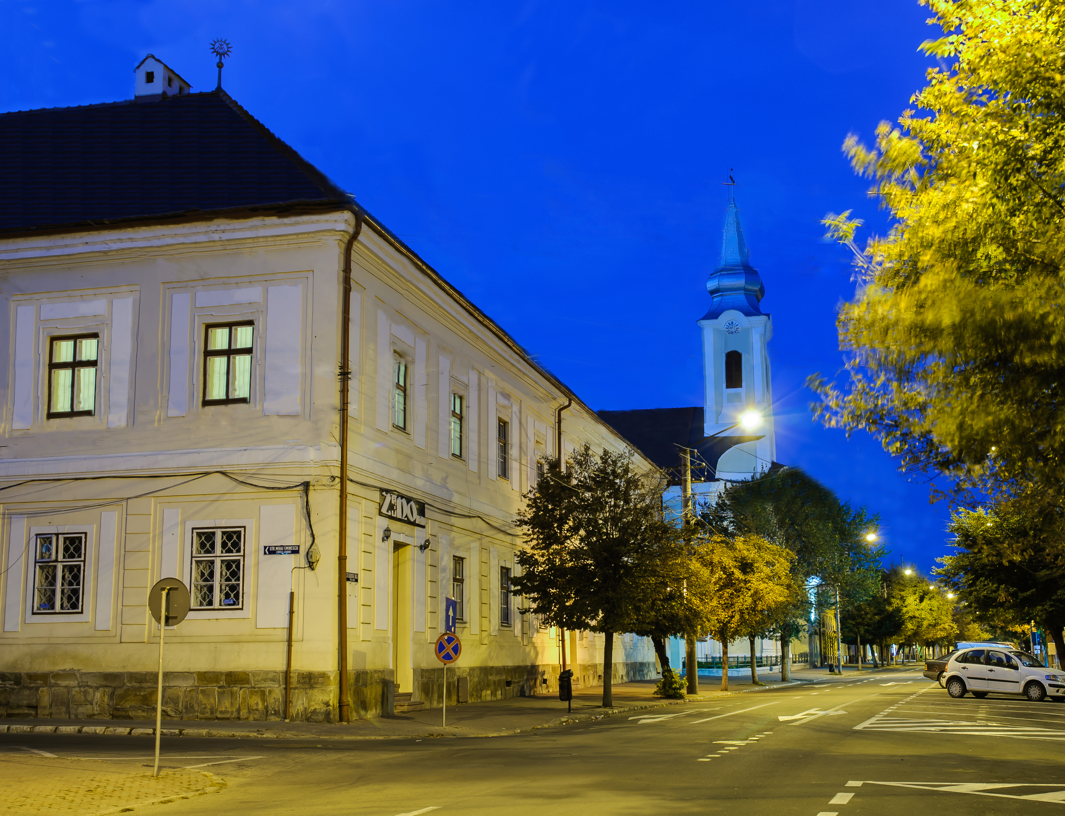 Beszterce-i Római Katolikus Plébánia és Templom.